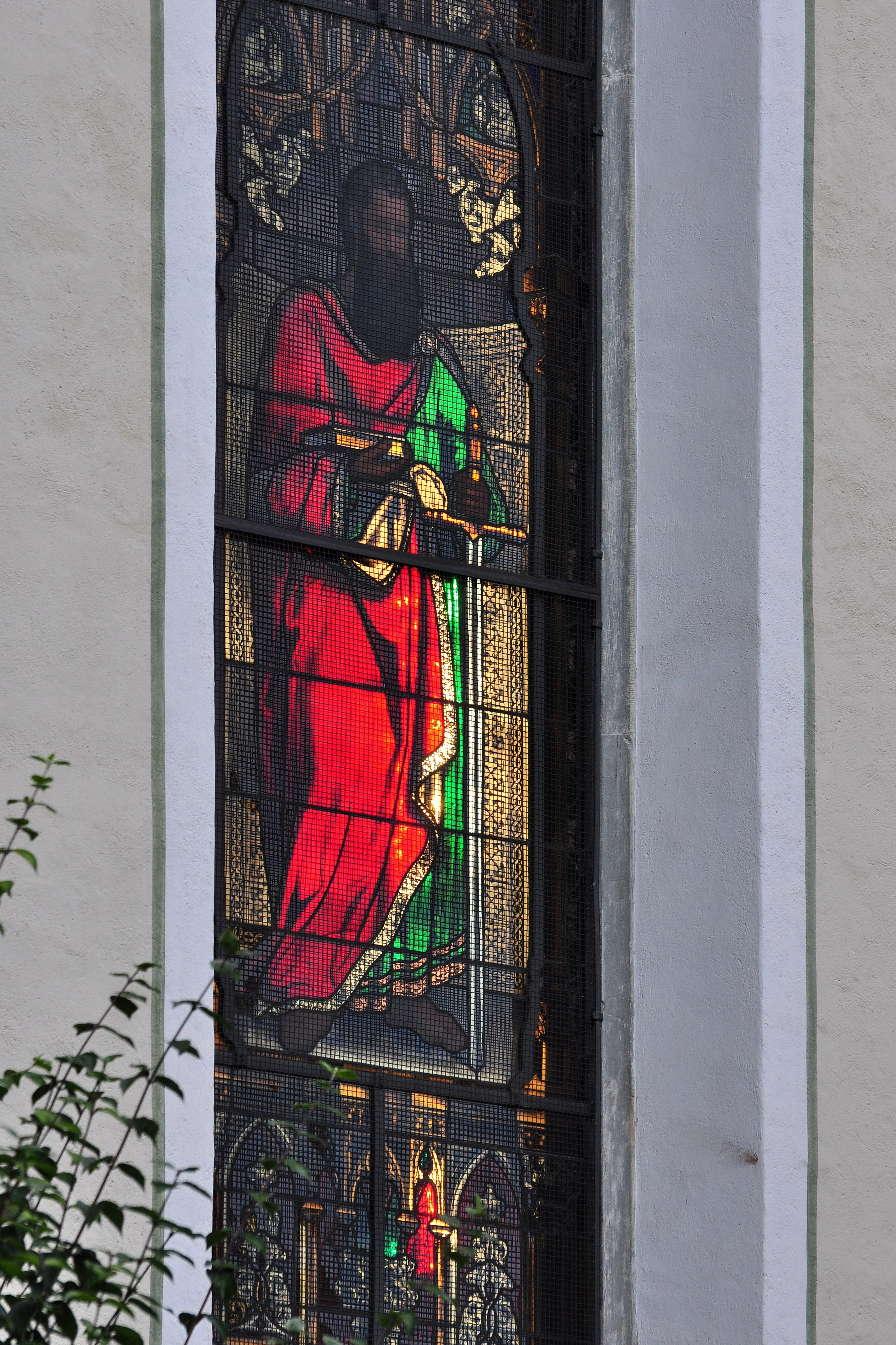 Reformierte Kirche, Schönenbergstrasse 9 in Wädenswil (Switzerland)